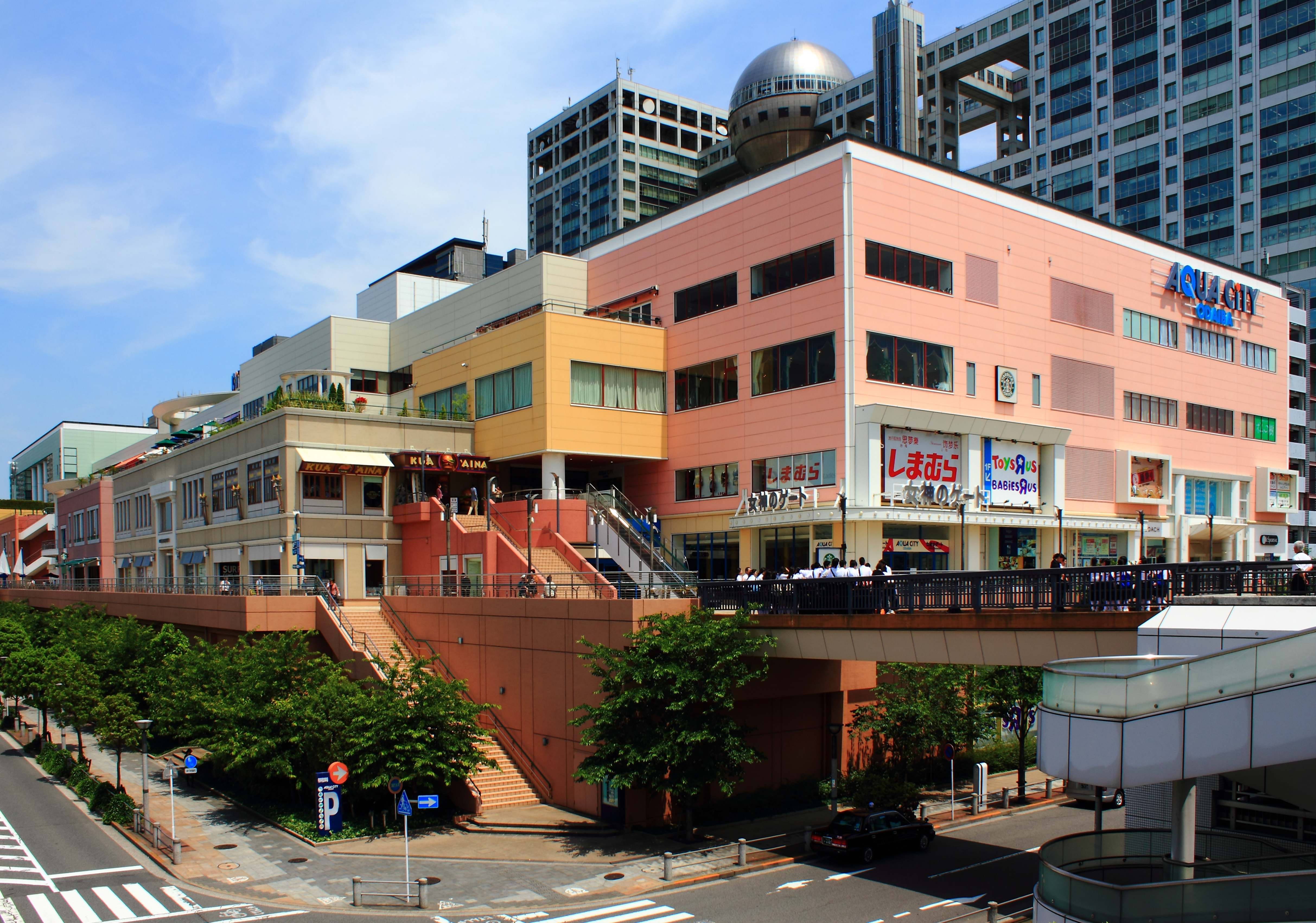 アクアシティお台場